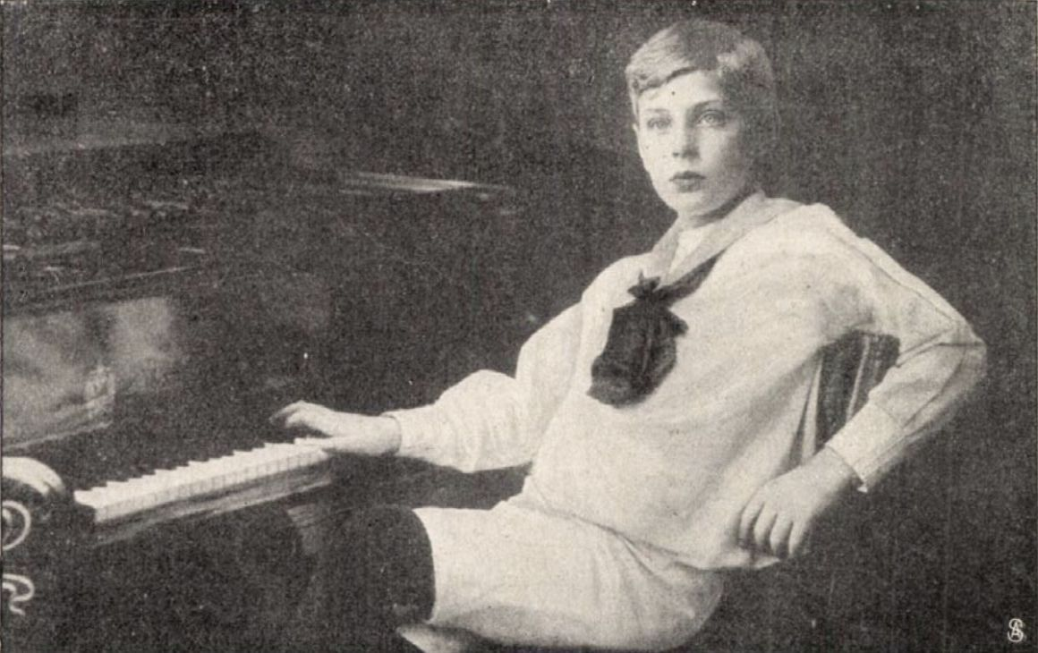 Széll György zongorista, későbbi karmester 12 éves korában